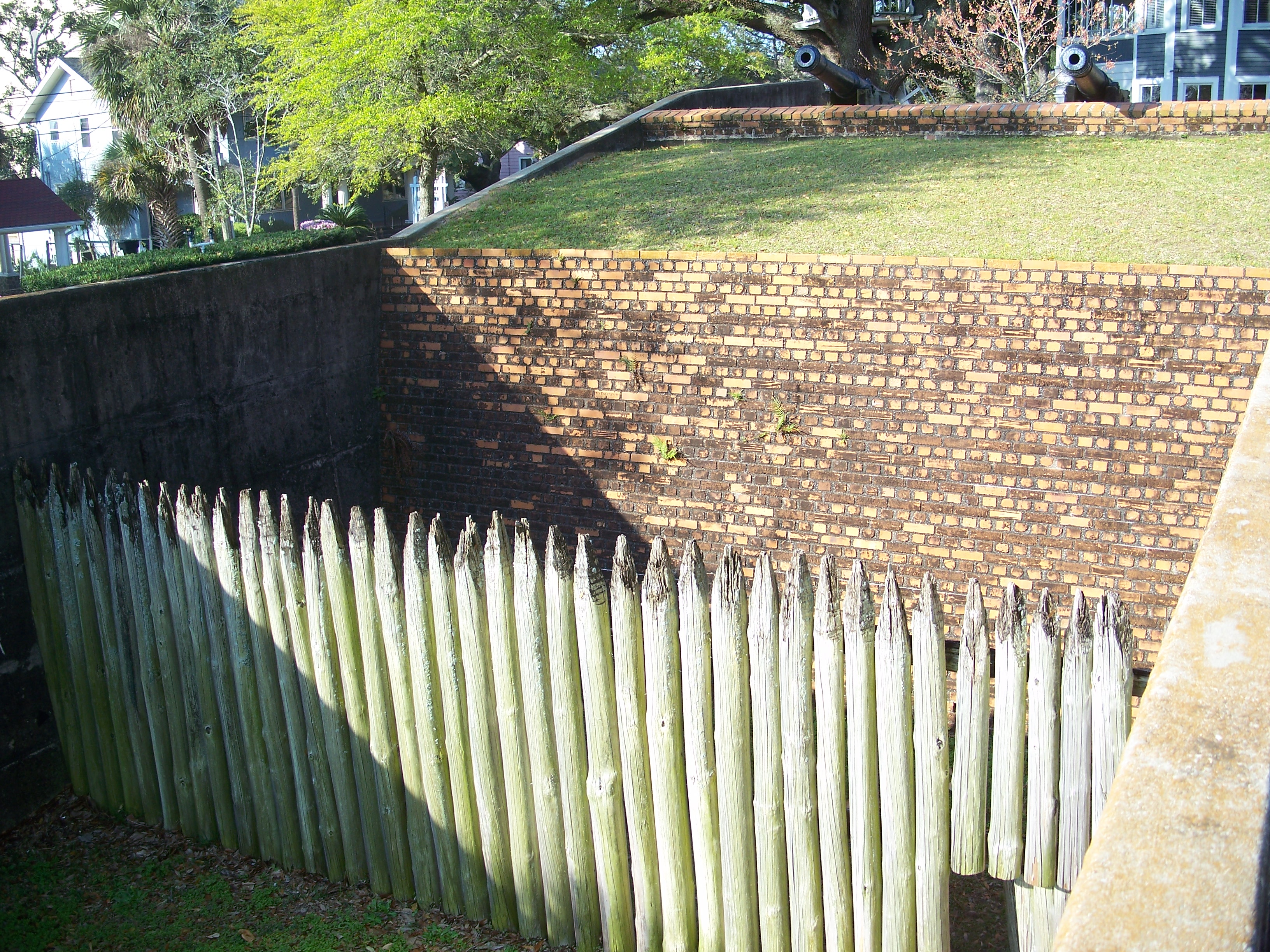 Pensacola, Florida: Fort George.